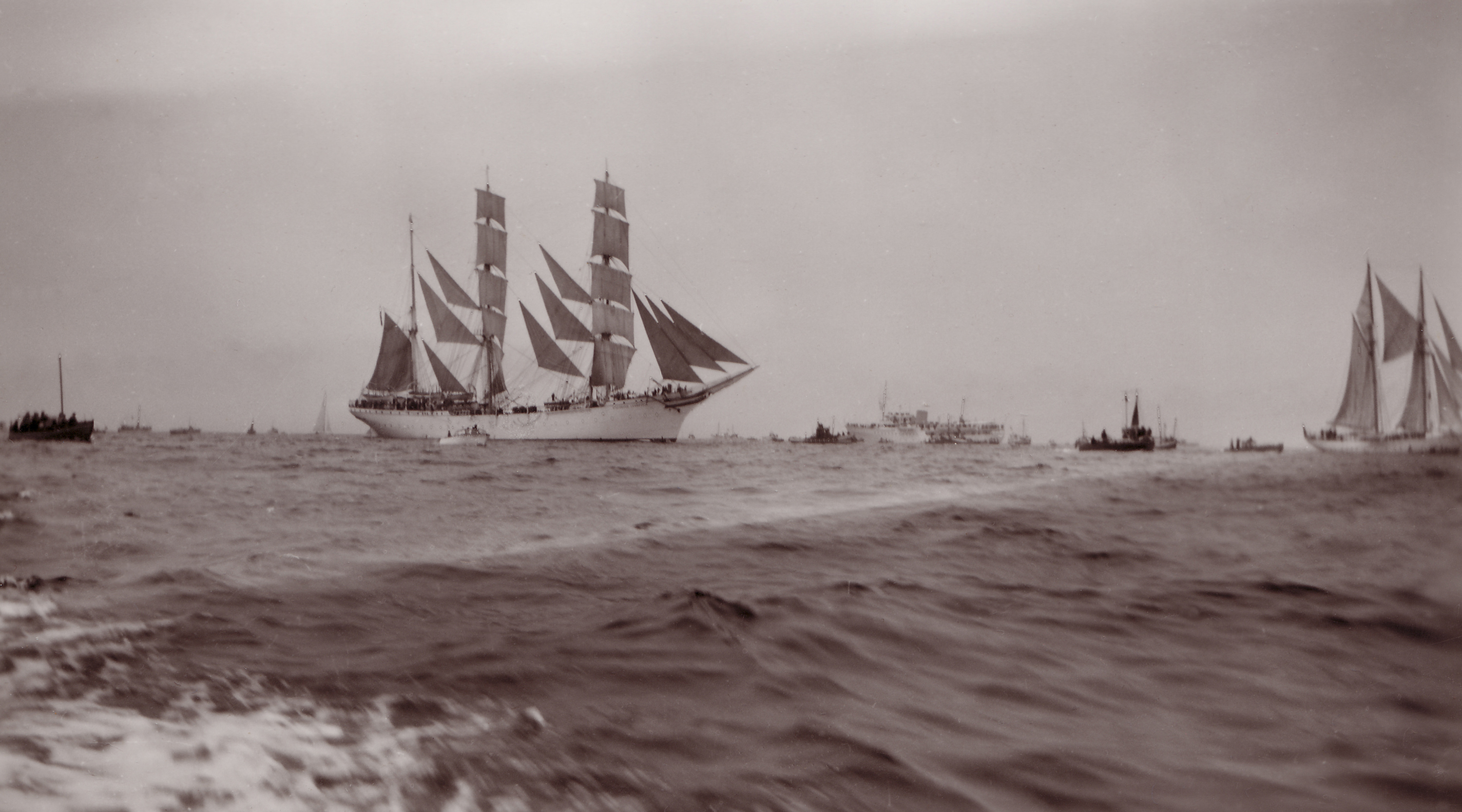 Norwegian Tall Ship "Statsraad Lehmkuhl"